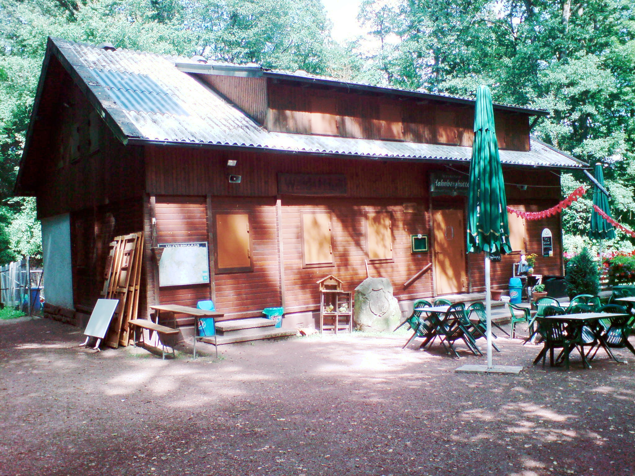 Die Hahnberghütte bei Niederauerbach.